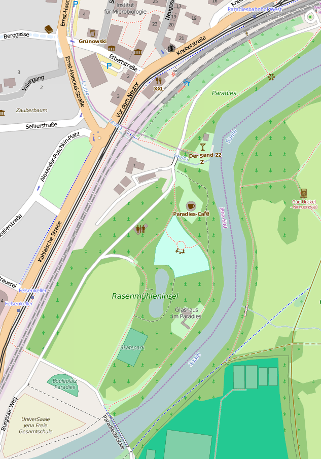 Die Rasenmühleninsel zwischen dem Paradies im Norden und der Oberaue im Osten Rechts der B88: Institut für Sportwissenschaften, Gutsmuths-Sportgymnasium, Sachsensümpfe